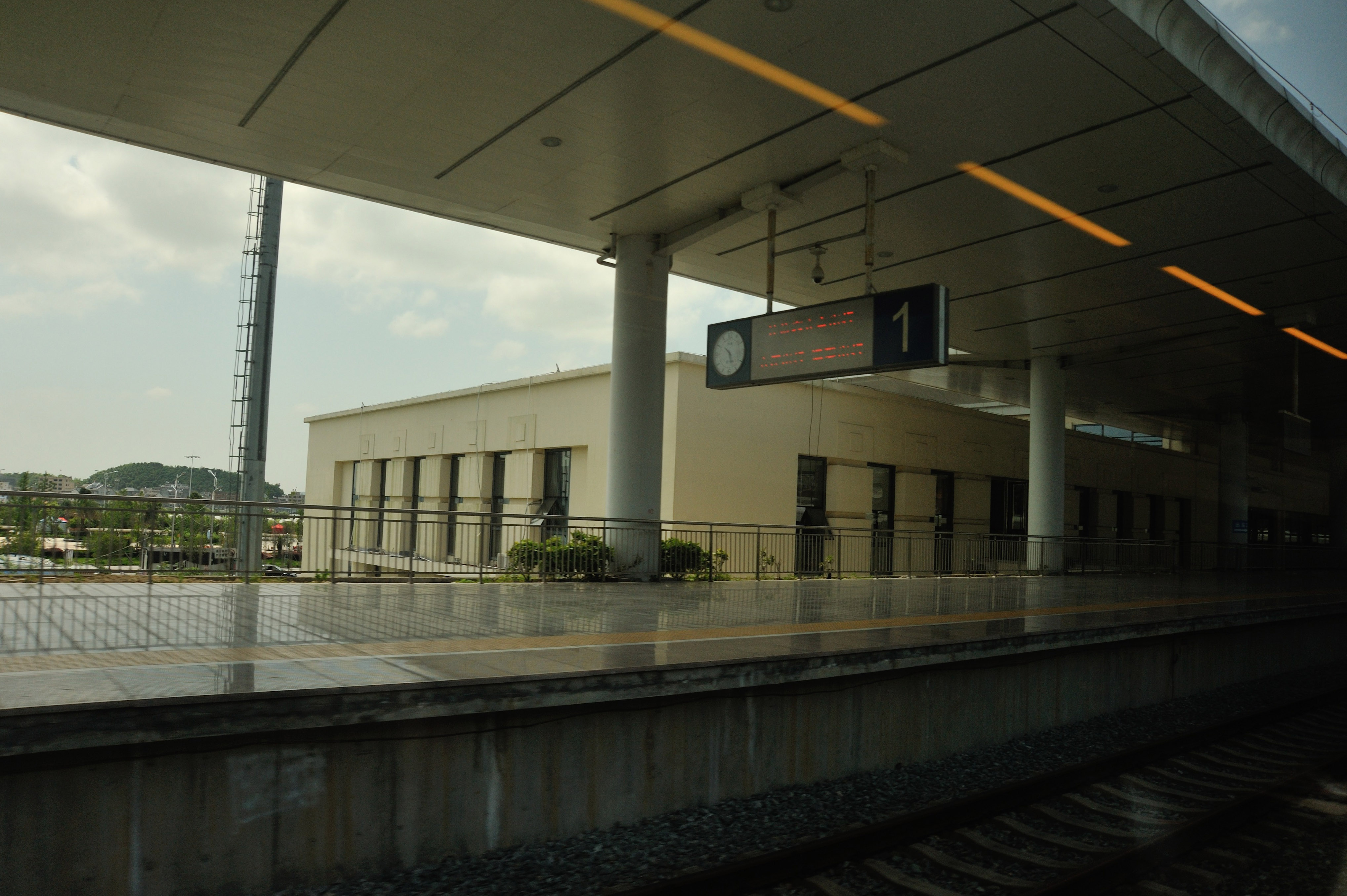 绅坊站站台